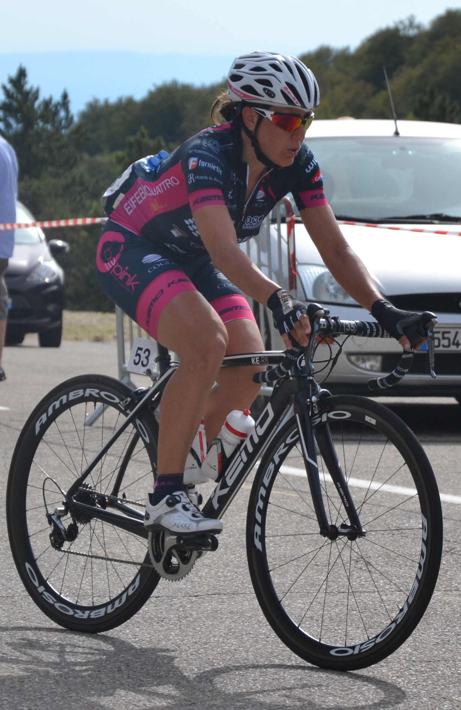 3ème étape du Tour féminin international de l'Ardèche 2016, lors de l’ascension du Mont Ventoux